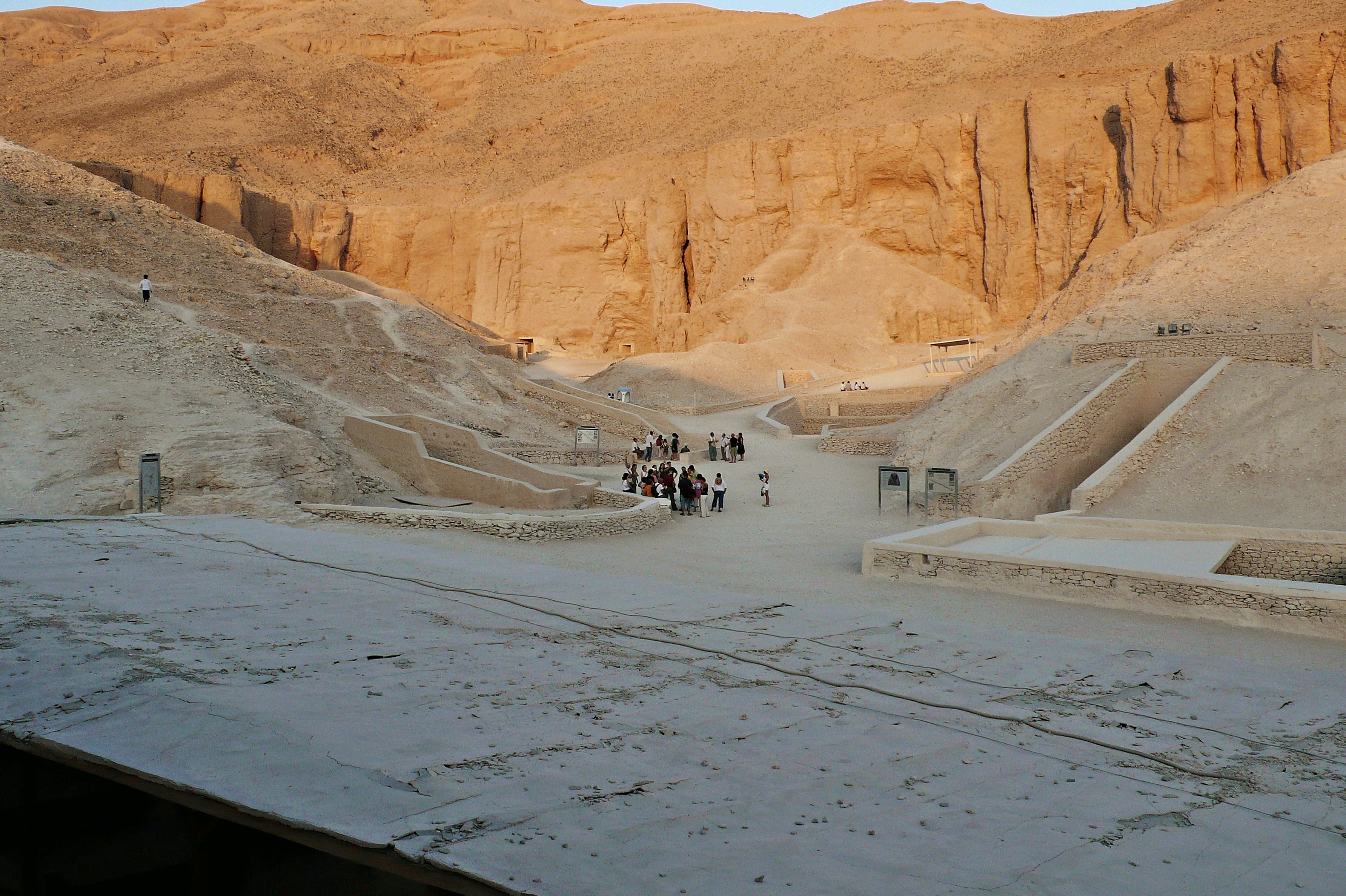 egipto